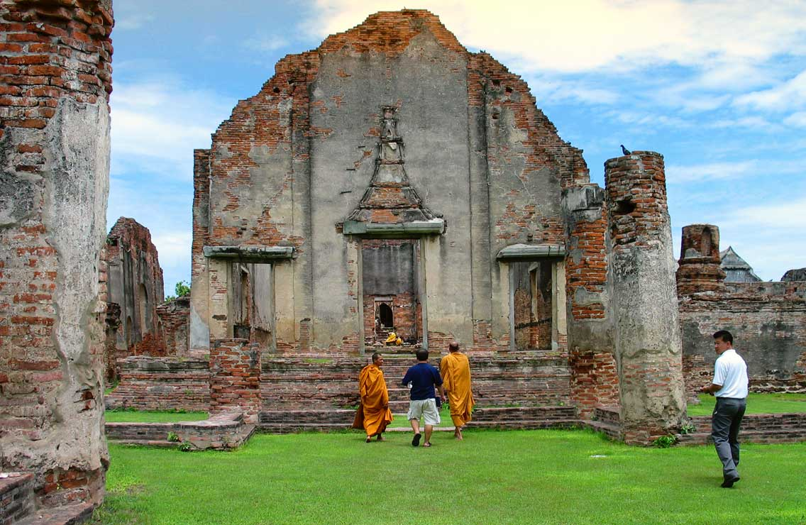 Wat Phra Sri Rattana Mahathat, Lopburi, Thailand